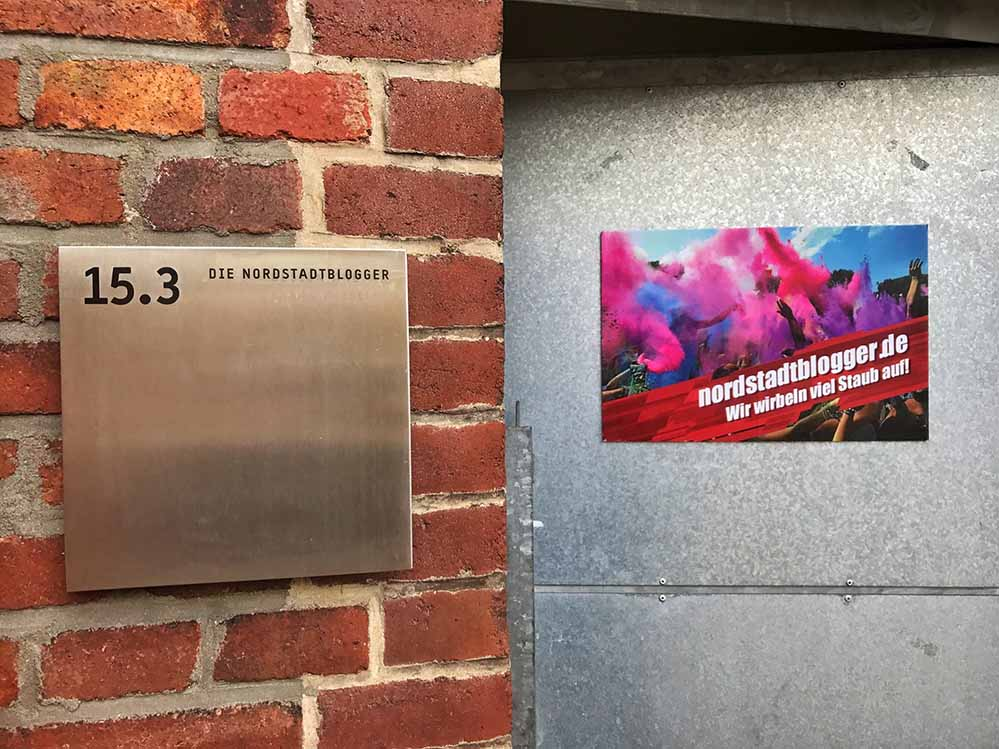 Büro Nordstadtblogger im Depot